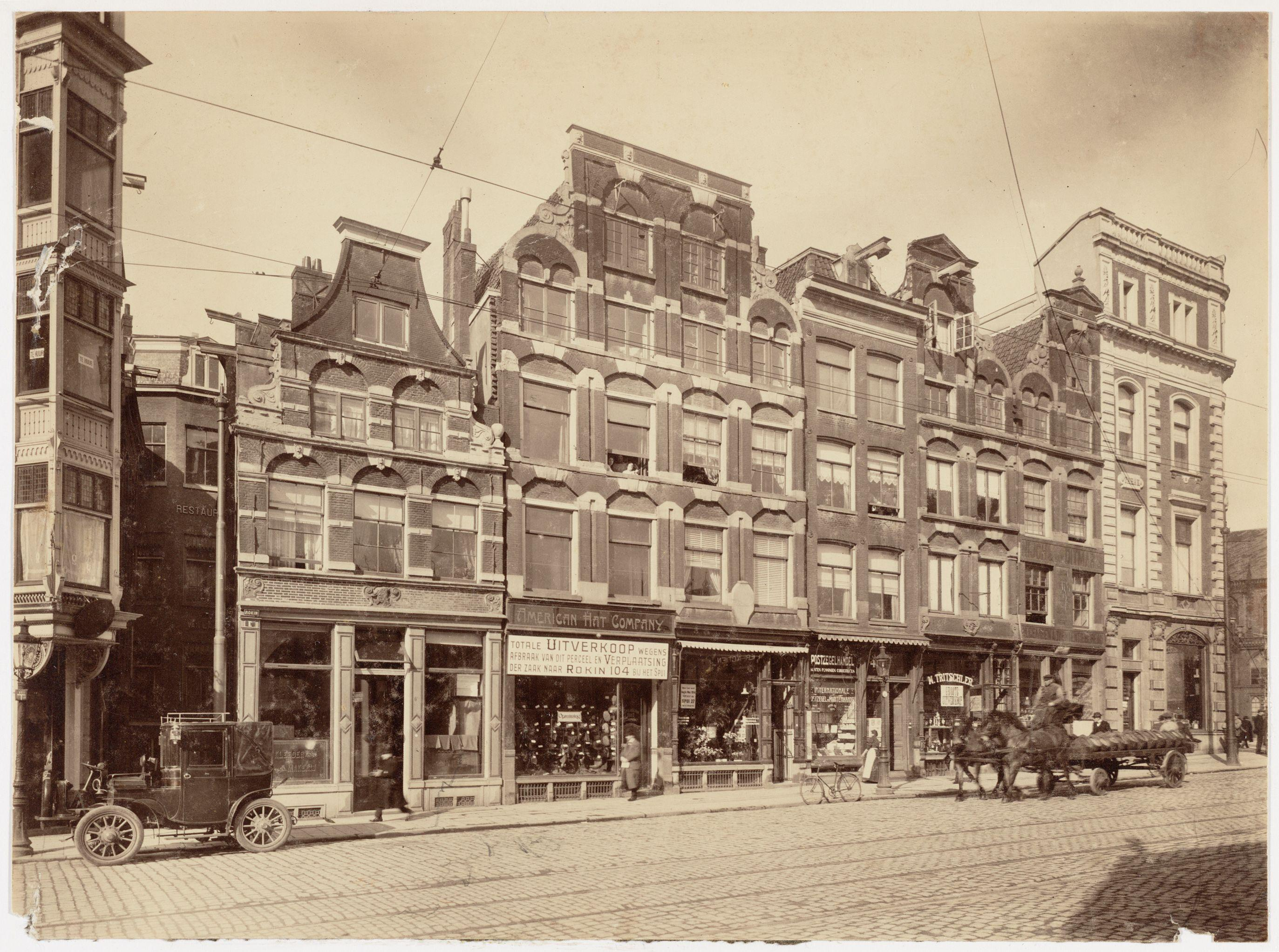 Beschrijving Rokin 2-2A-4-6-8-10 (ged.) (v.r.n.l.) Naast nummer 8 de ingang van de Kromelleboogsteeg (voorheen Beurssteeg). Rechts op de hoek Dam 30. Later de zijgevel van het modemagazijn Peek & Cloppenburg, Dam 16. Huizen aan de voormalige Beursstraat gesloopt in 1914. Documenttype foto Vervaardiger Onbekend Anoniem Collectie Archief van het Bureau Monumentenzorg: glasnegatieven en negatiefloze foto's Datering 1914 Geografische naam Kromelleboogsteeg Dam Rokin Dam Inventarissen Afbeeldingsbestand 012000002988